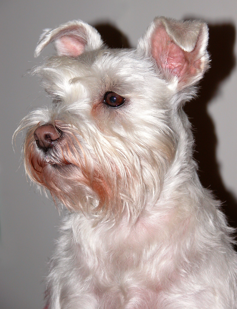 Schnauzer, Zwergschauzer Aufgenommen 2004 bei einer Hundeausstellung in Dresden Ej rastypisk.